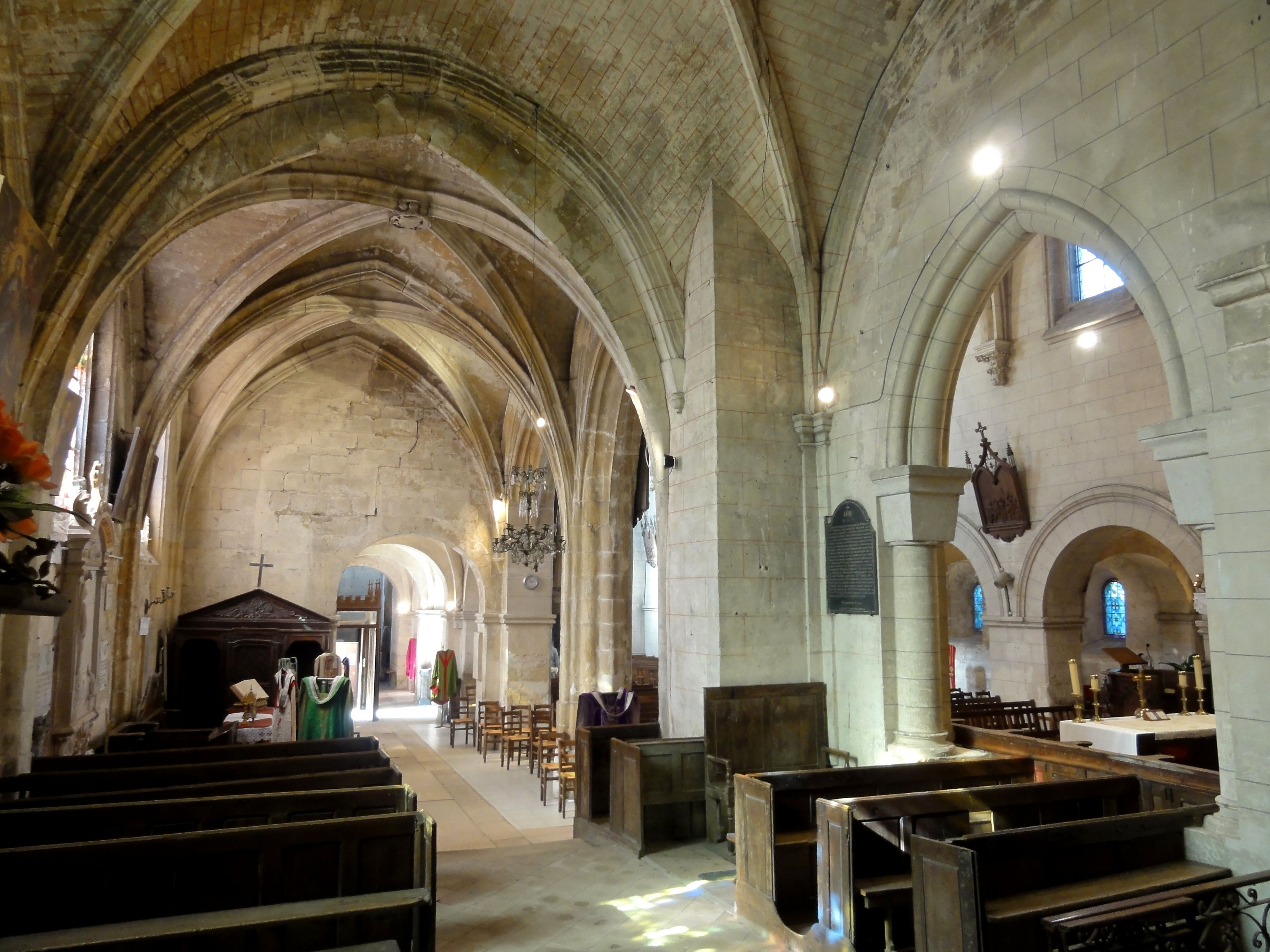 Chapelle sud, vue vers l'ouest.